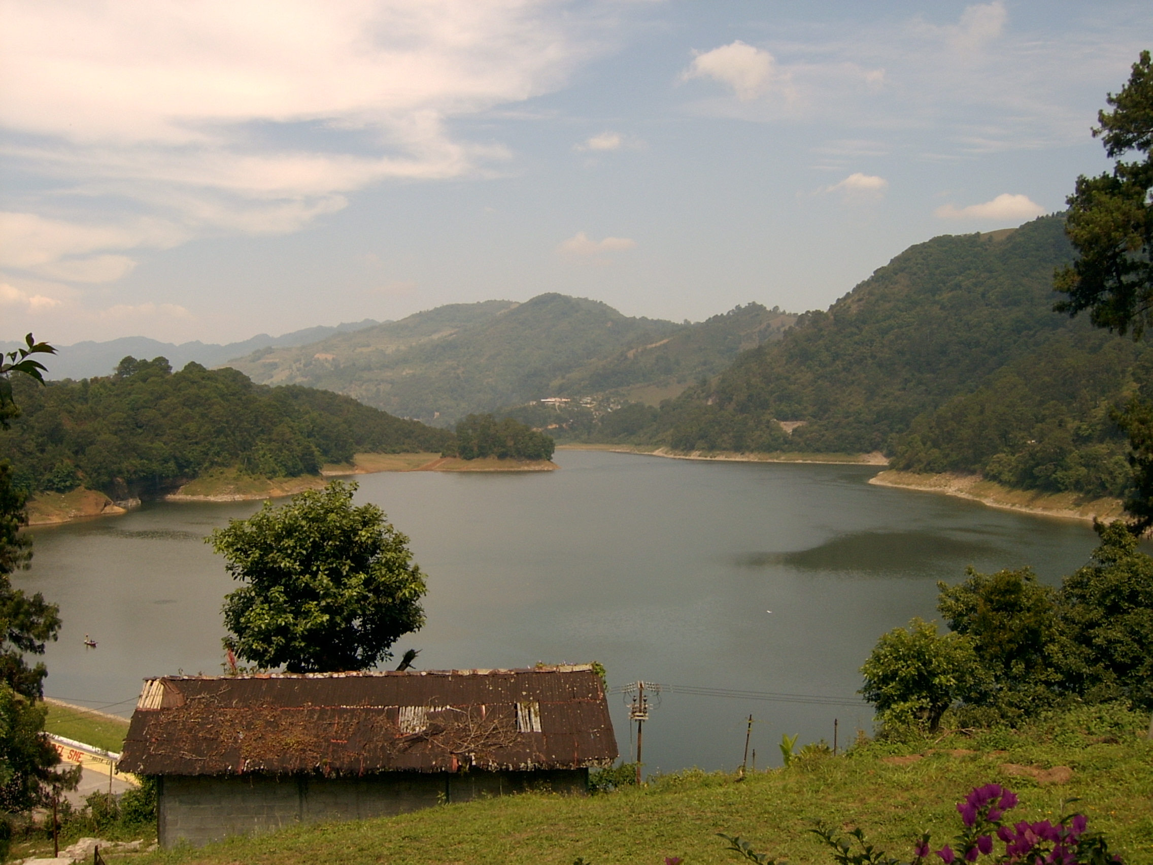 Rio Necaxa, Puebla Mexico.